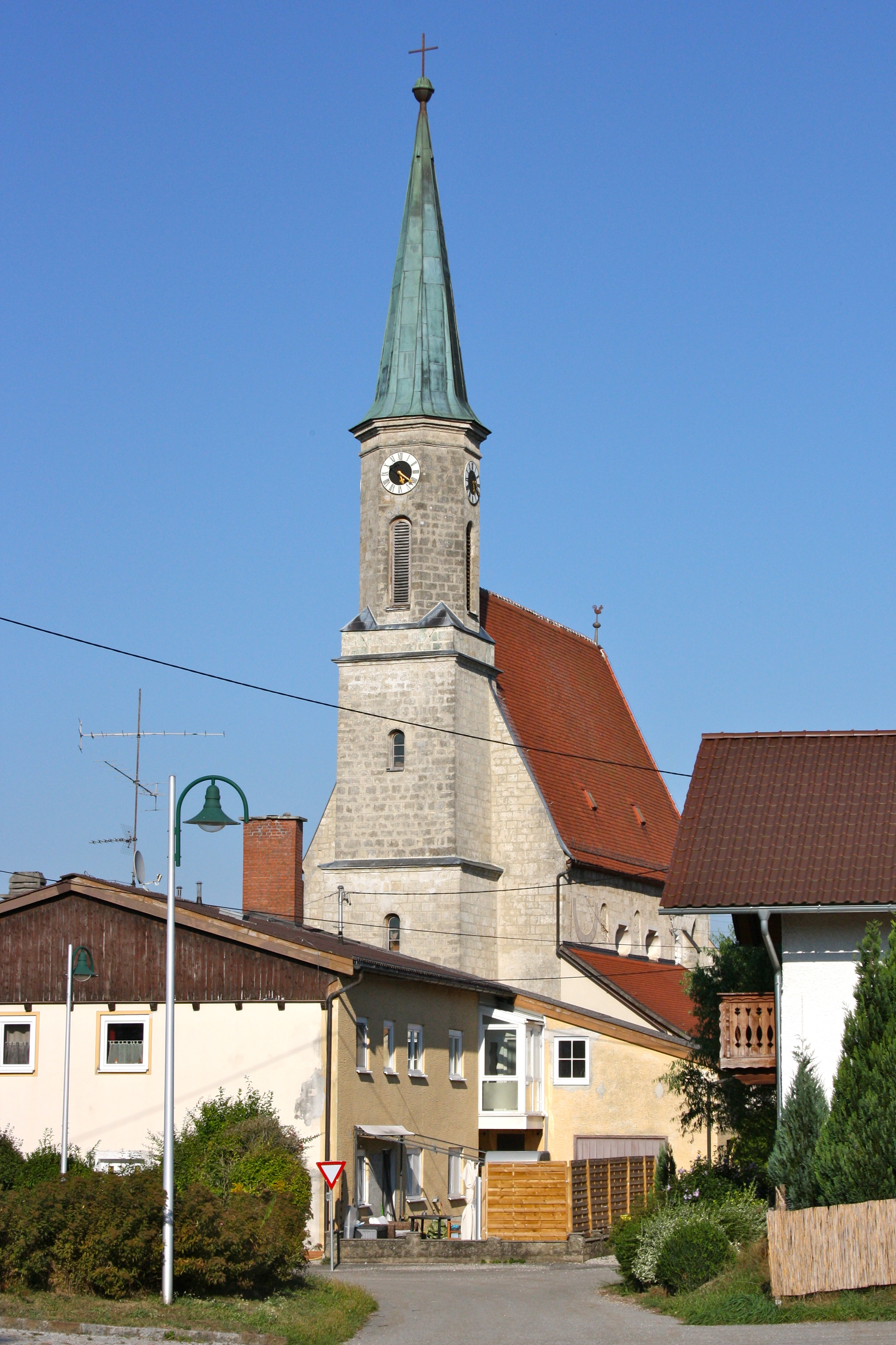 Kath. Pfarrkirche hl. Petrus in Überackern. Object location48° 11′ 33.31″ N, 12° 52′ 34.28″ E